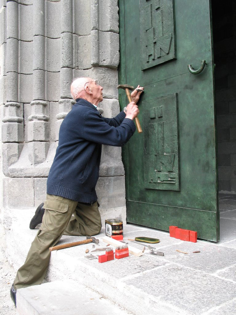 Marino di Teana signe la porte en Bronze qu'il a créé en 2006 de l'église Notre Dame de St Flour dans le cadre de sa restauration par les architectes des batiment de France, Stefan & Alice Manciulescu